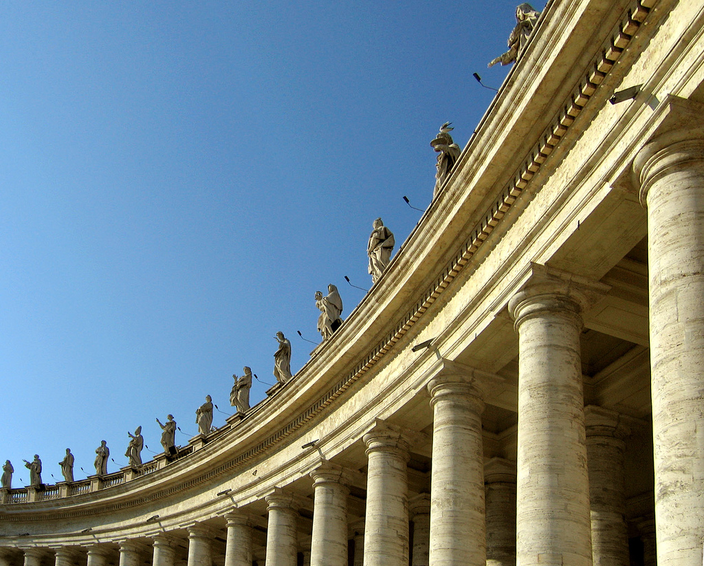 Colonnato del Bernini